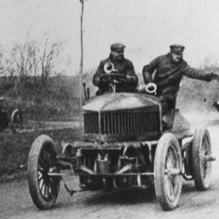 Véhicule Audibert et Lavirotte Torpille: Voiture de course 30 cv de 1900.